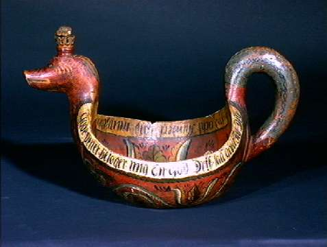 Kjenge fra Hordaland. Lengde 42 cm. Nå på Norsk Folkemuseum i Oslo. NF.1898-0610.